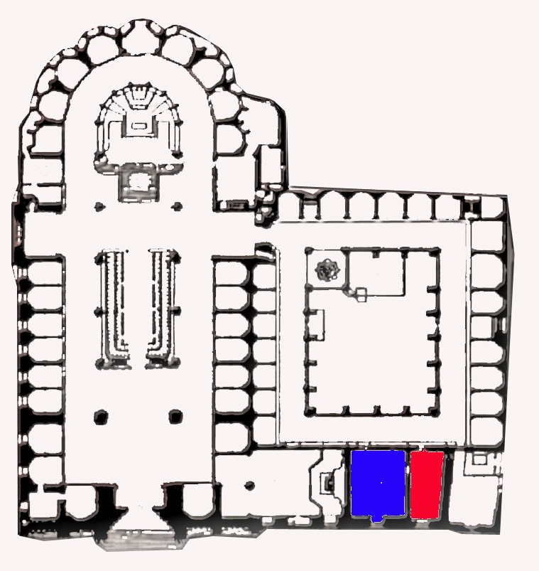 Situació de la sala capitular nova (en vermell) i de la sala de capbrevació (en blau) dins de la catedral de Barcelona